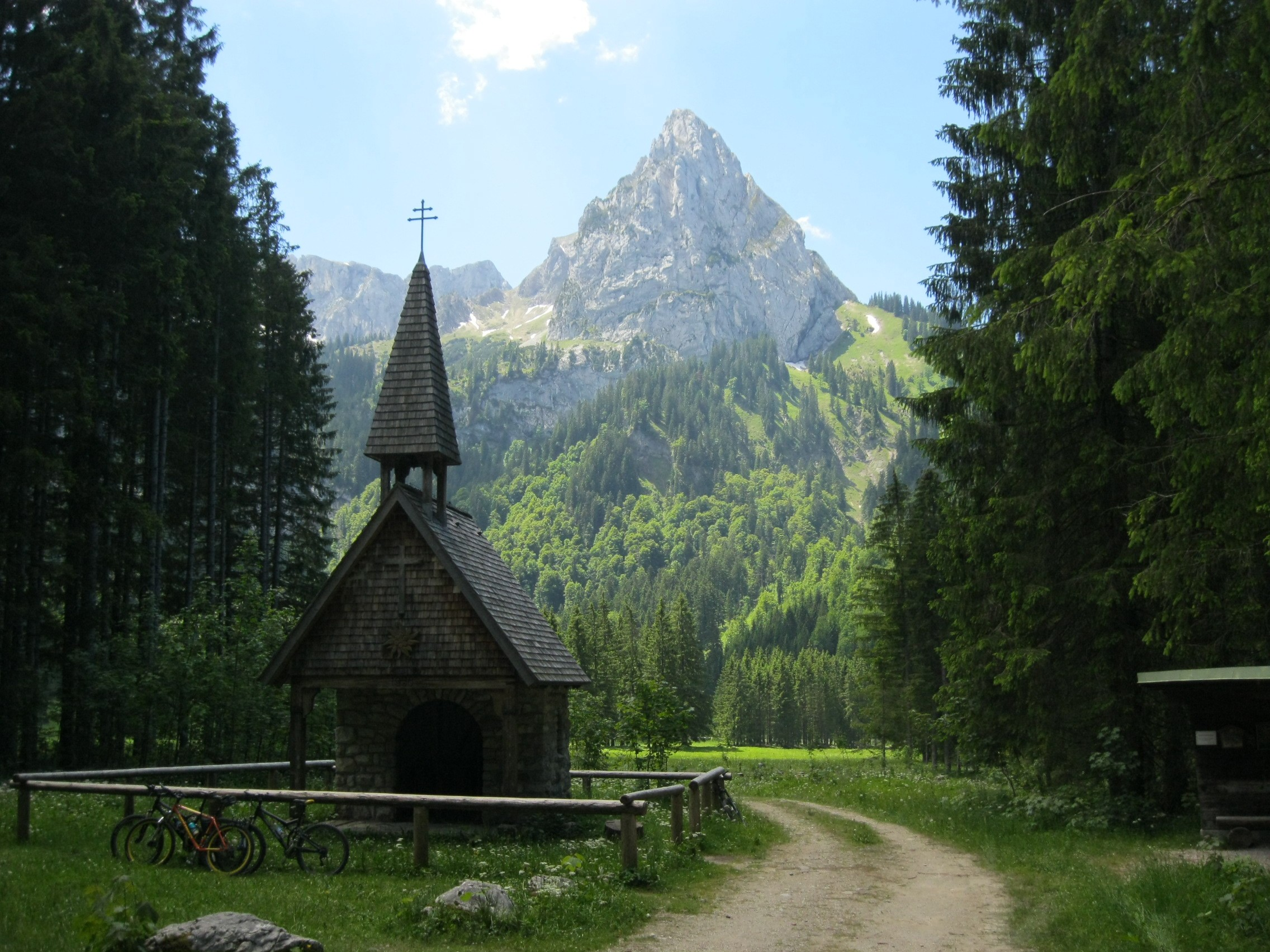 Die Wankerfleck-Kapelle, im Hintergrund der Geiselstein